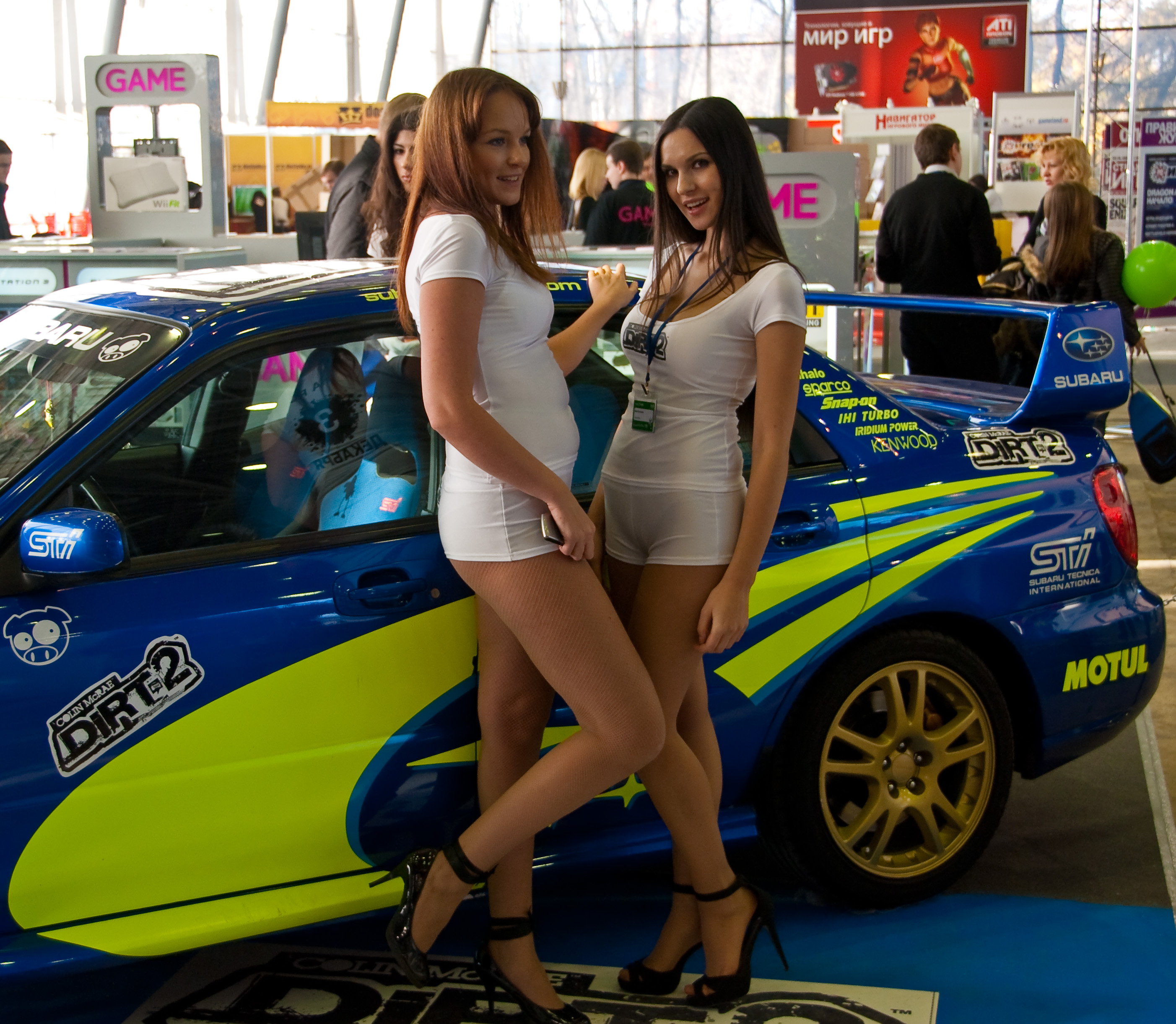 Dirt 2 girls at Igromir 2009